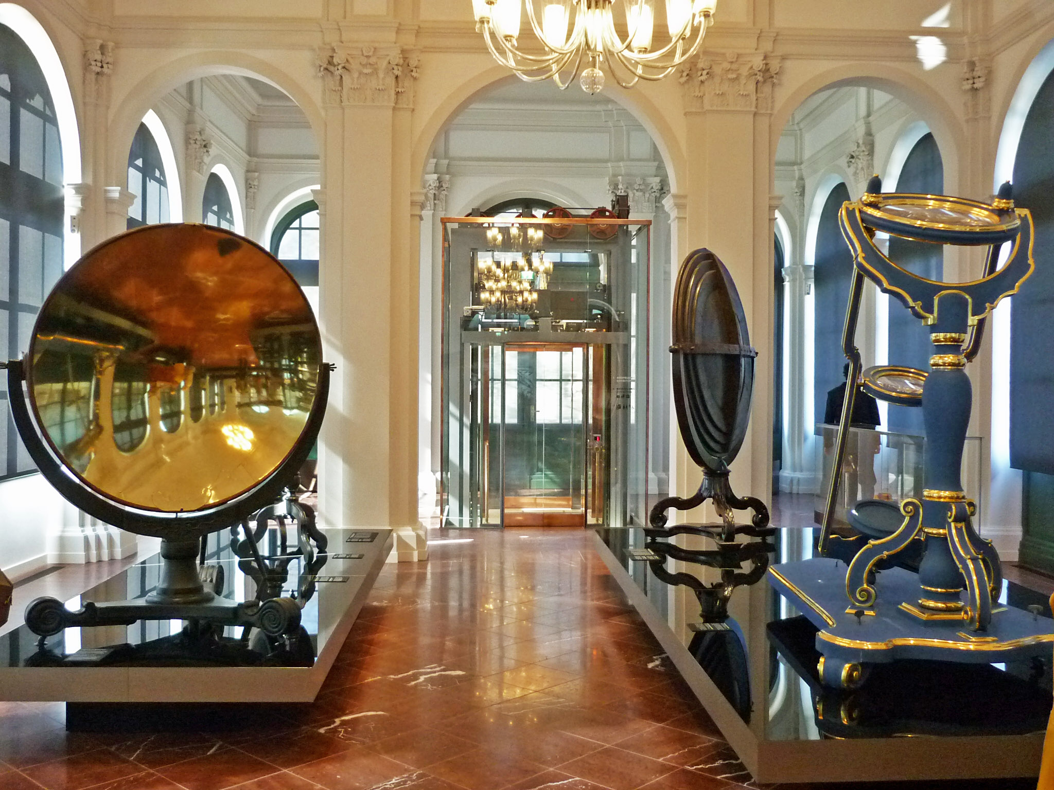 Mathematisch-Physikalischer Salon - ehem. Festsaal (im Zwinger in Dresden, nach der Neueröffnung im April 2013)